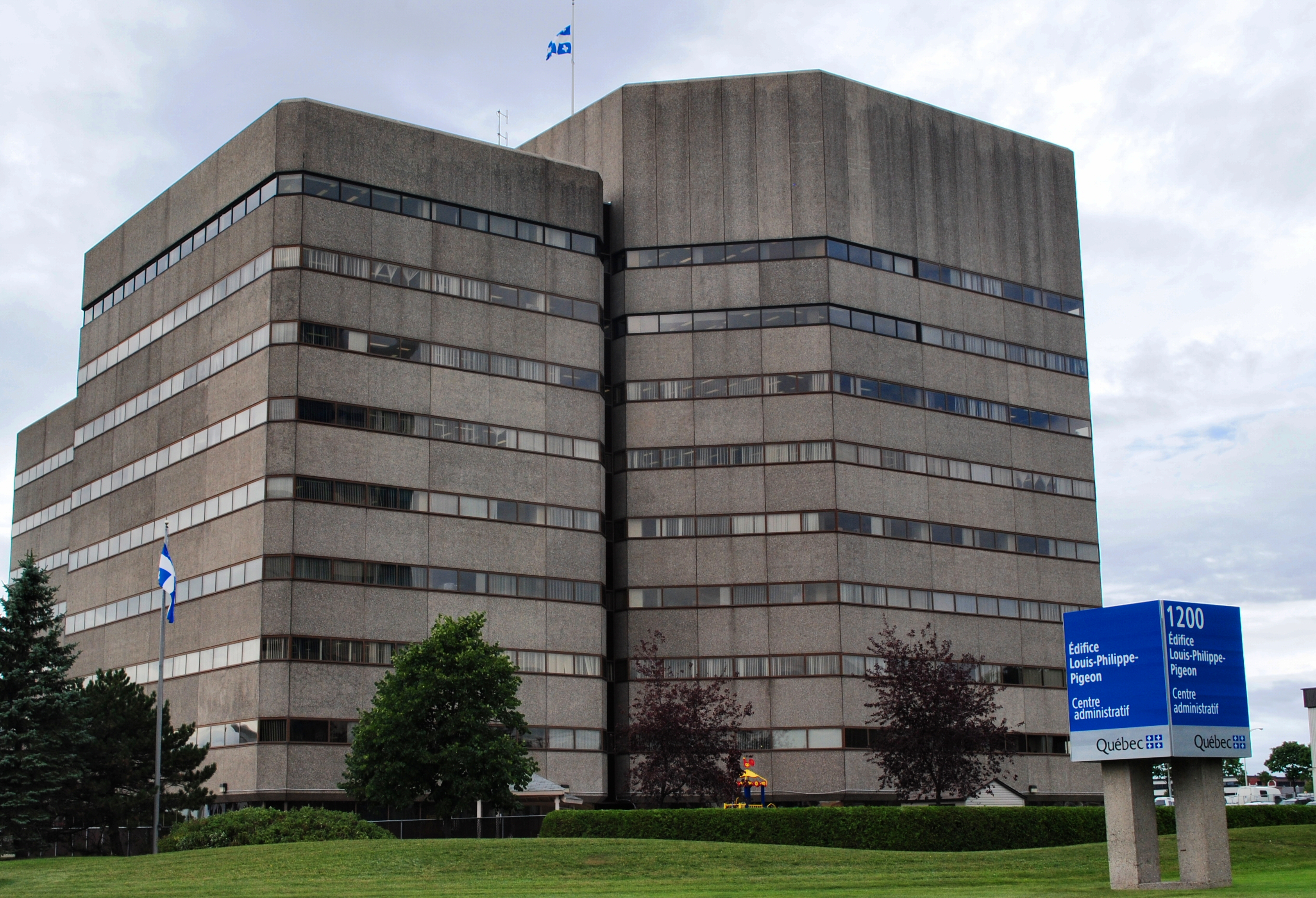 Édifice Louis-Philippe Pigeon, à l'angle du boulevard Laurier et de la route de l'Église, à Québec